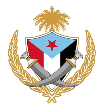 شعار المجلس الانتقالي الجنوبي